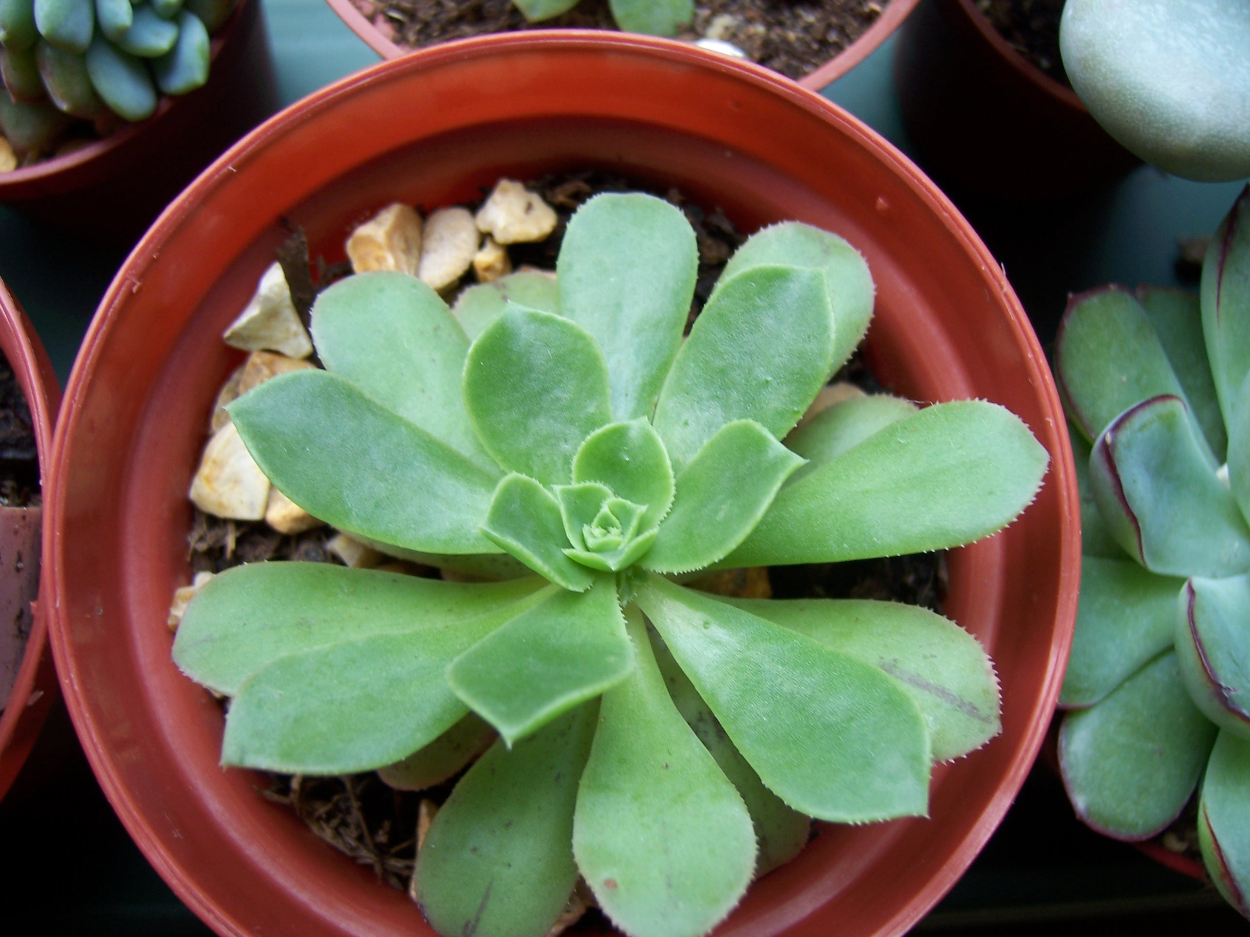 Aeonium Castillo-Paviae